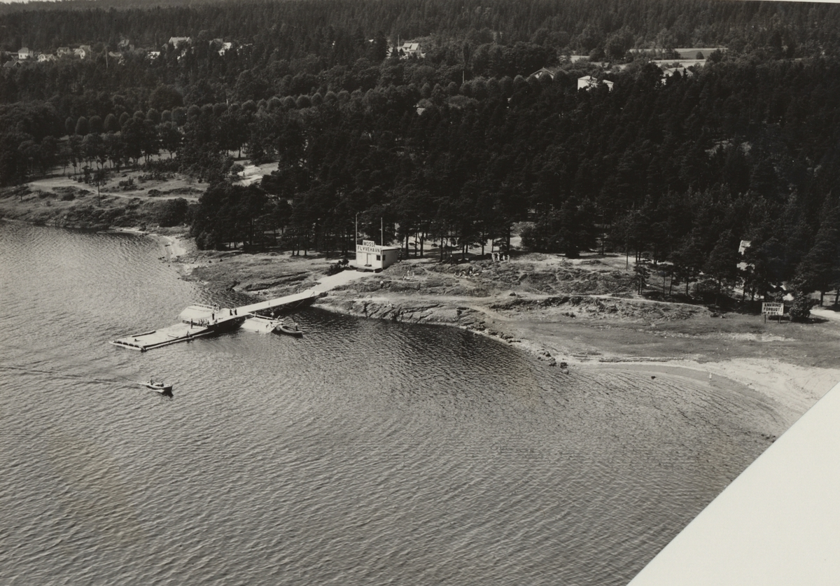 Moss flyvehavn på Jeløy, flyfoto ant i slutten av 1930-tallet. Skilt på bygning: Moss flyvehavn. Skilt med teksten: Ankring forbud KABEL.